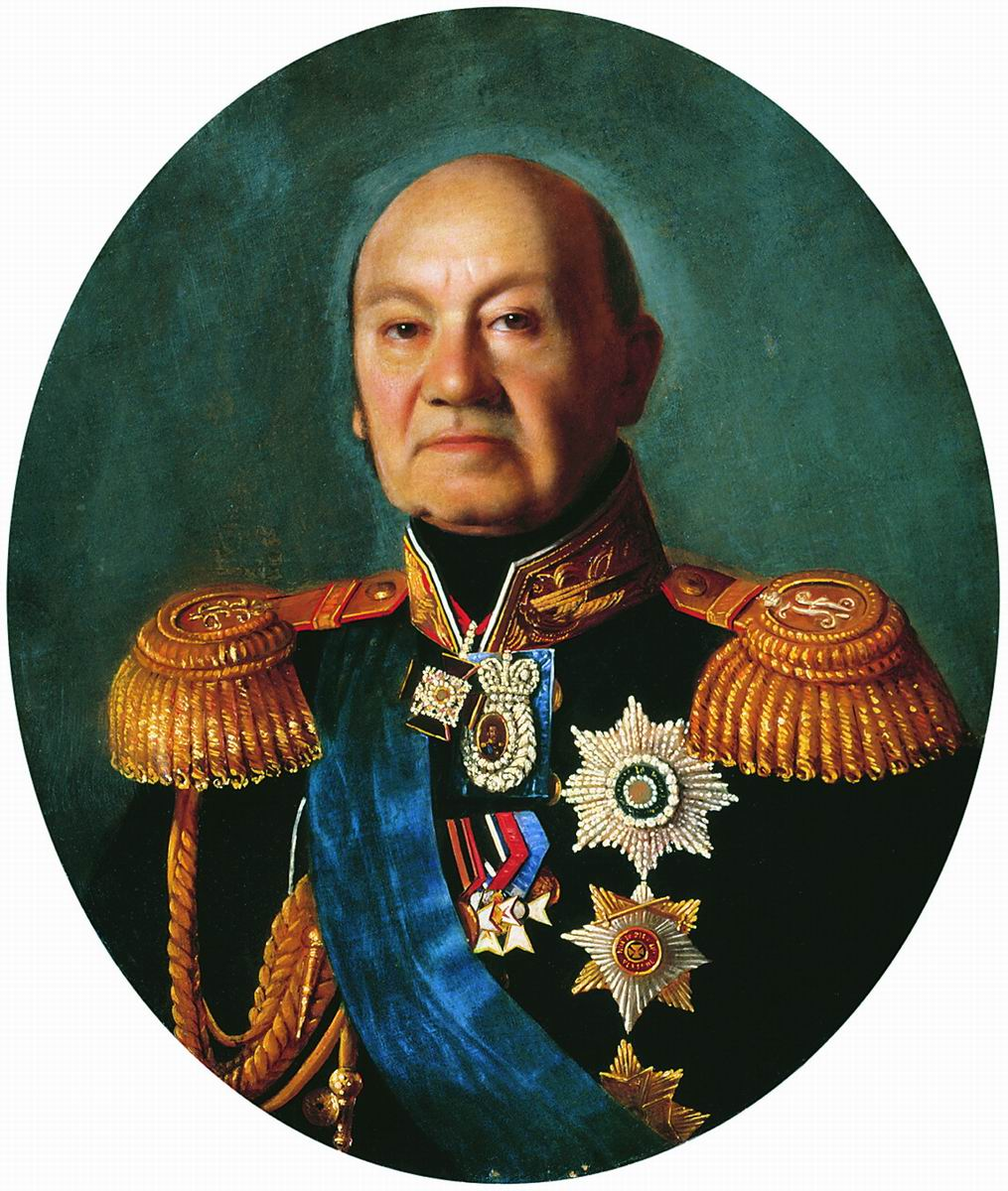 Портрет генерал-адъютанта графа Арсения Андреевича Закревского Не ранее 1848